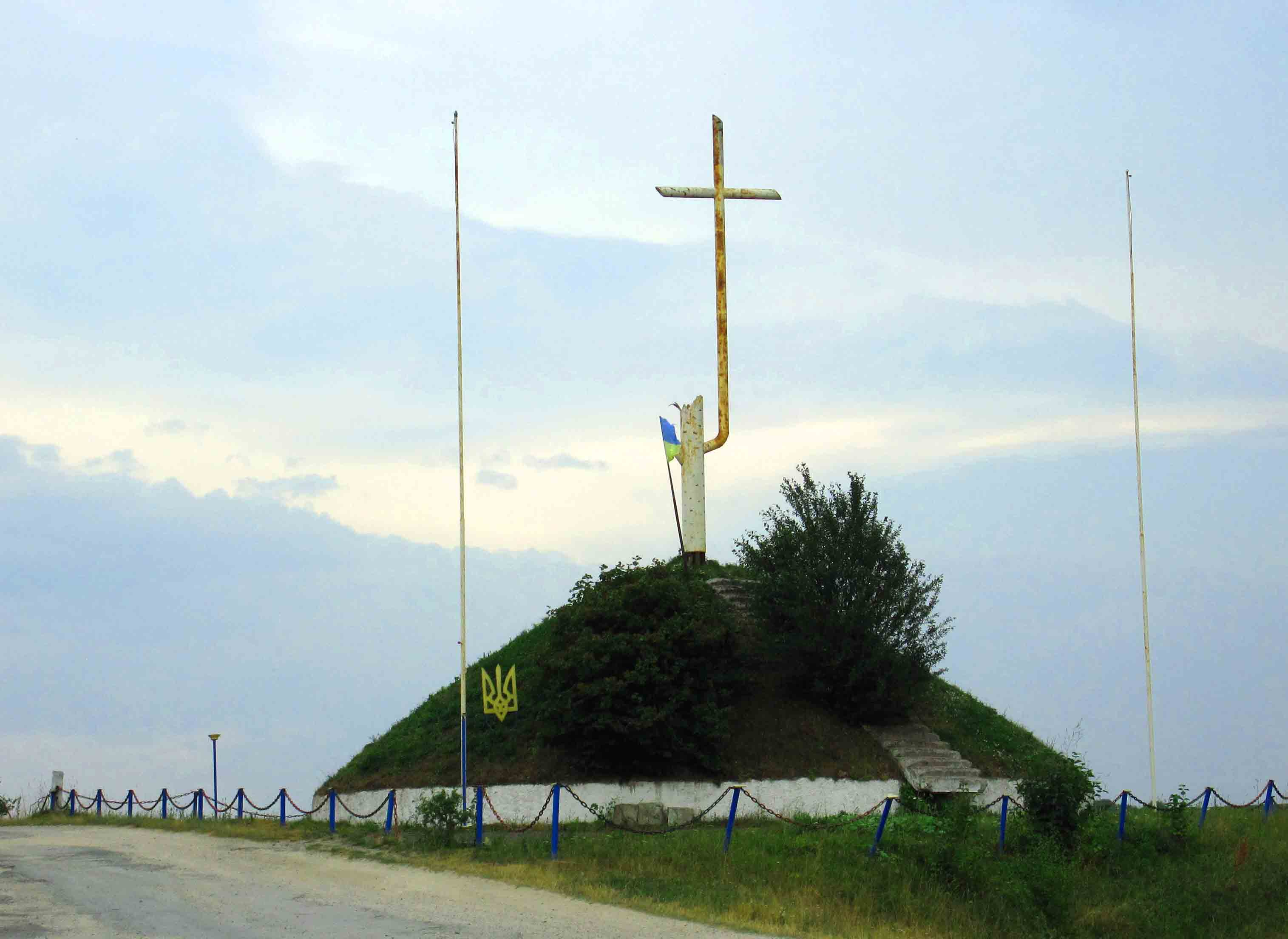 символічна могила Борцям за волю України (1993) у Загір’ї Зборівського району Тернопільської області